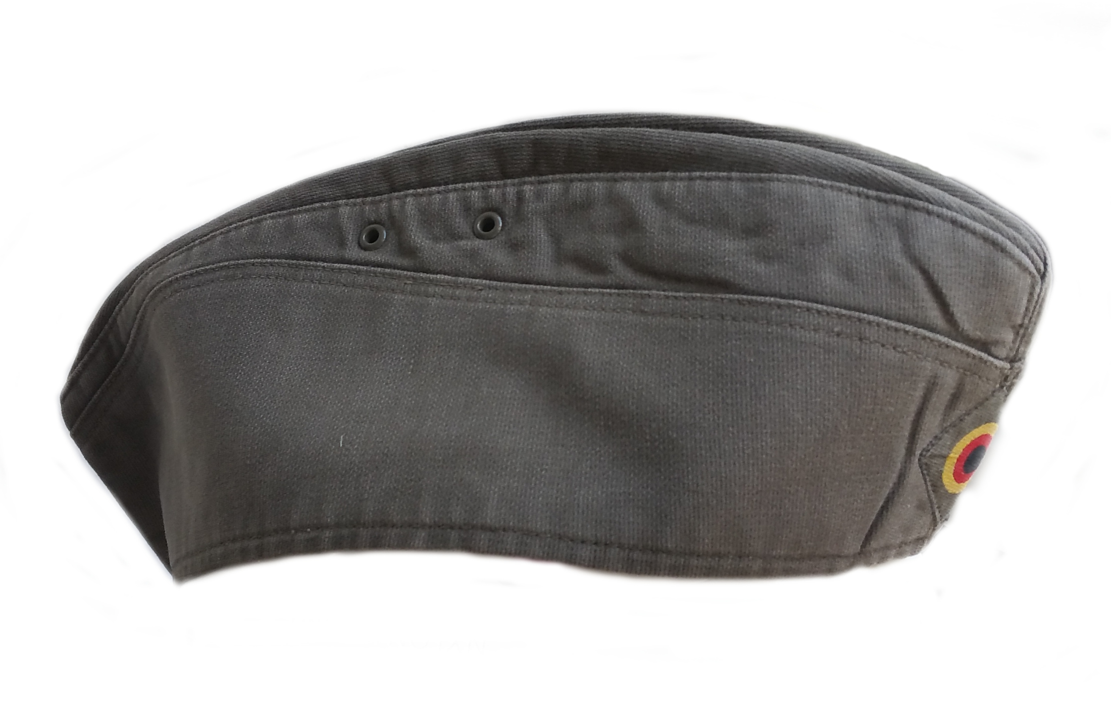 Schiffchen (Kopfbedeckung) Bundeswehr für Heer Schmidt + Hartlieb 5 / 87 Größe 61 40 Grad Waschbar, Bügelbar mit lauem Eisen, Schonende Reinigung Perchlorethylen